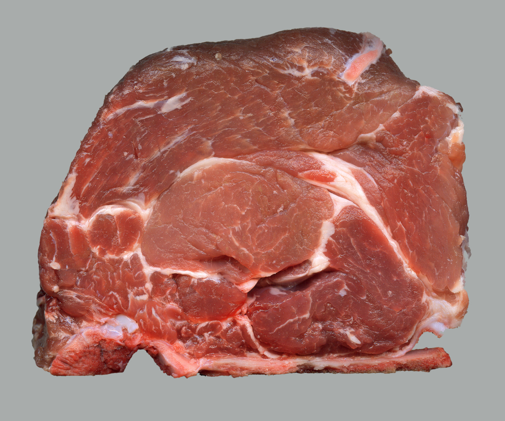 Schweinenacken mit Knochen. Eigenes Bild